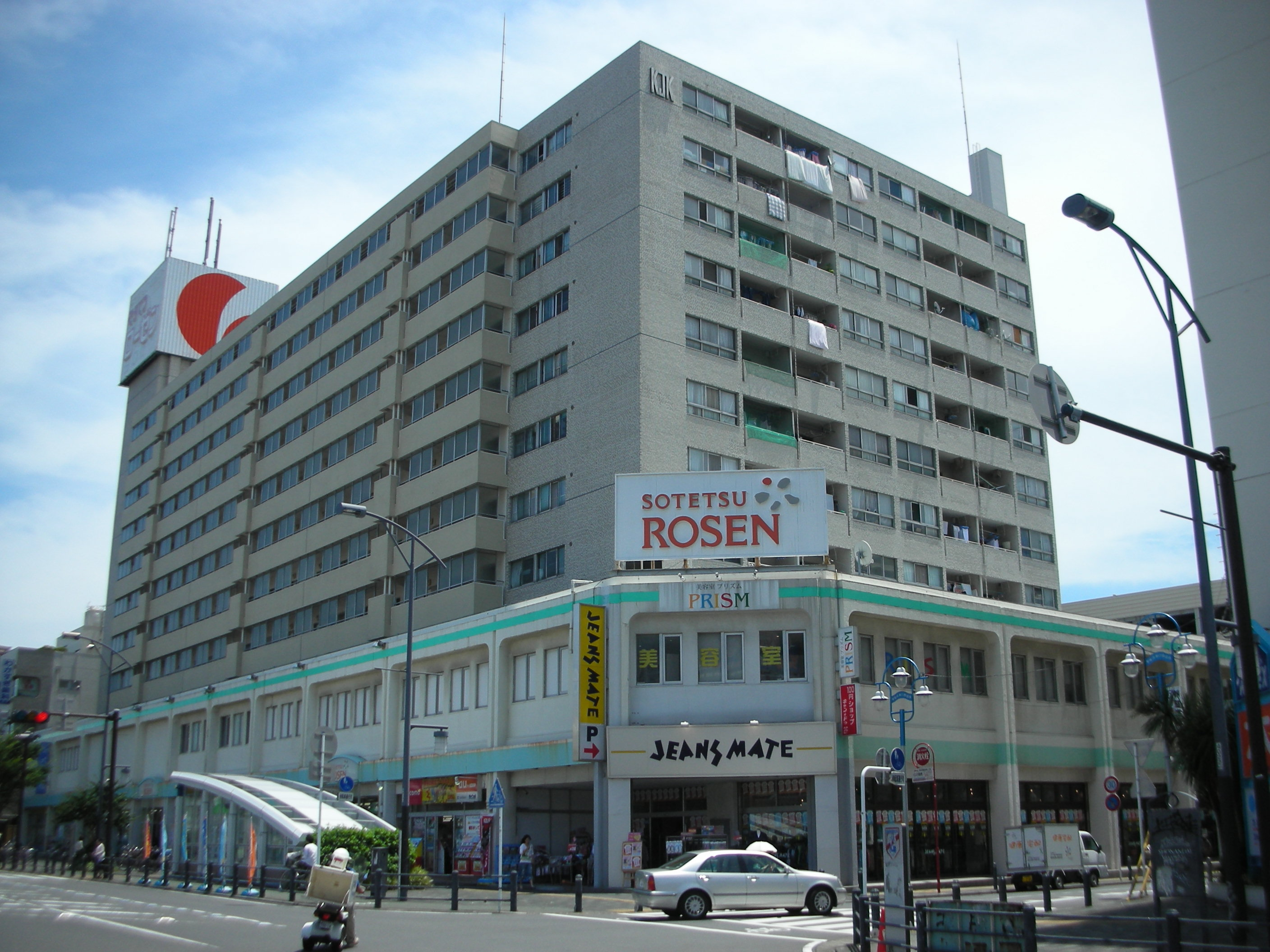 そうてつローゼン湘南台店の外観。左上の看板は会社ロゴマーク、正面の看板は店舗シンボルマーク。